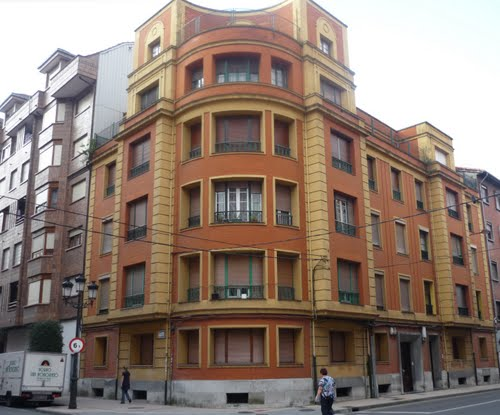 Edificio "Los Alemanes", para ingenieros de Duro Felguera en los años 40 (La Felguera) Asturias